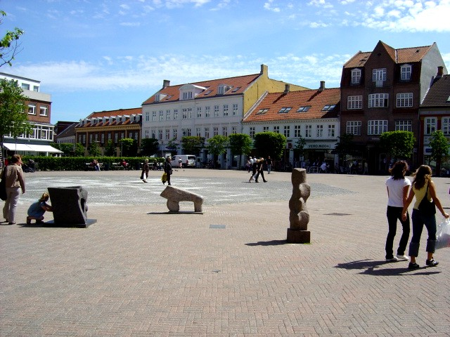 Eigen foto - Denemarken 2005 Ben Pirard